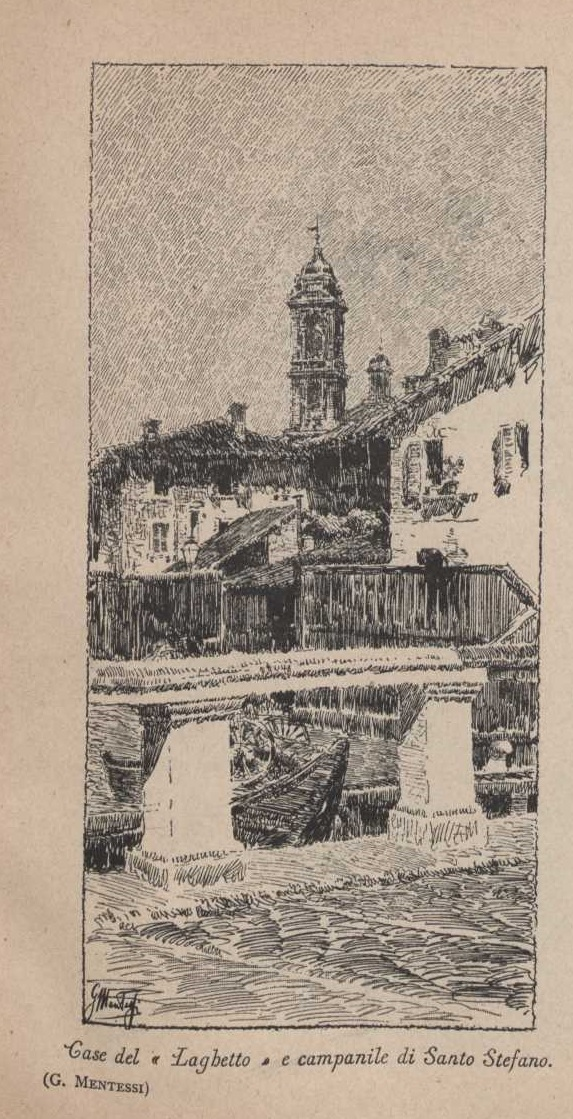 Case del Laghetto e campanile di Santo Stefano maggiore tratto da l naviglio : strenna del Pio Istituto dei Rachitici di Milano